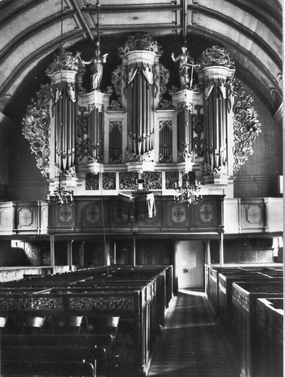 ehemalige Orgel des Meisters Berner in der Stadtkirche zu Jever, erbaut 1756-1759, Ostfriesland, zerstört 1959 beim Brand der Kirche